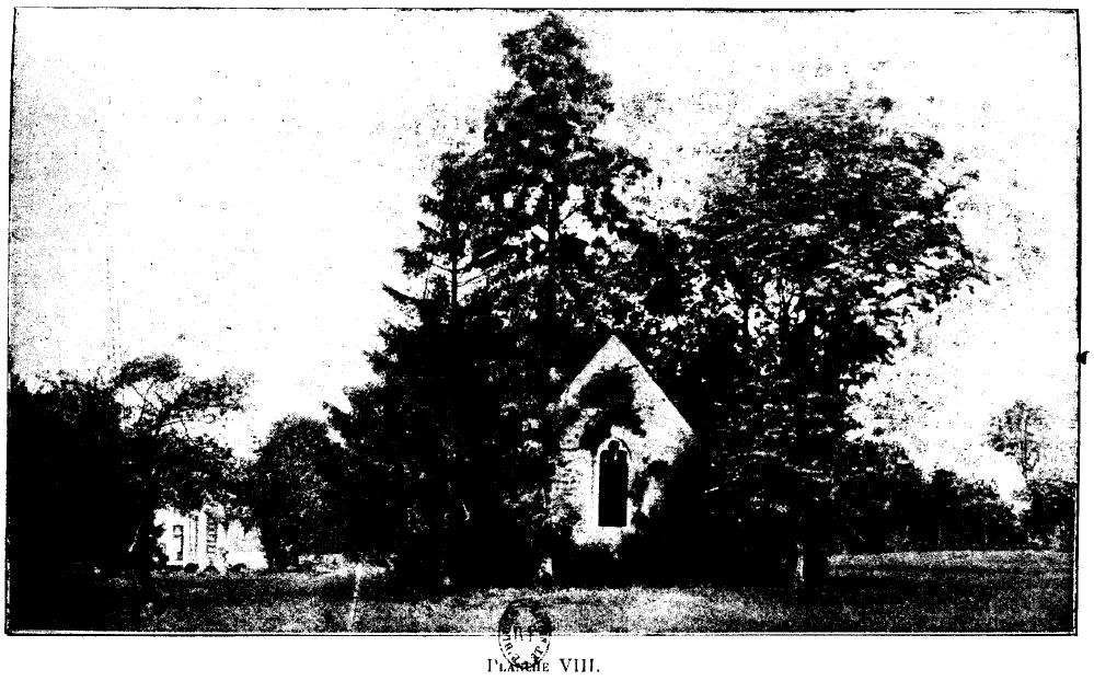 Le Donjon de Courmenant, ses origines, ses seigneurs et possesseurs, son musée